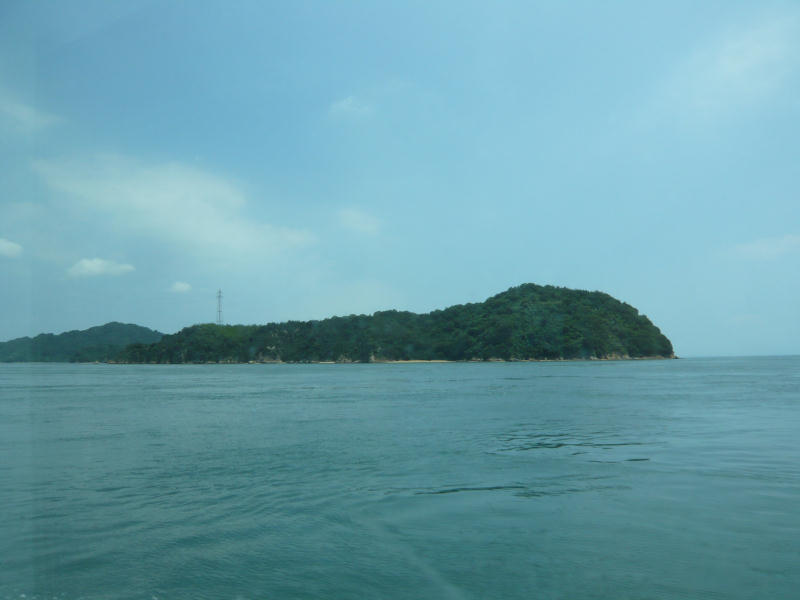 上島町津波島